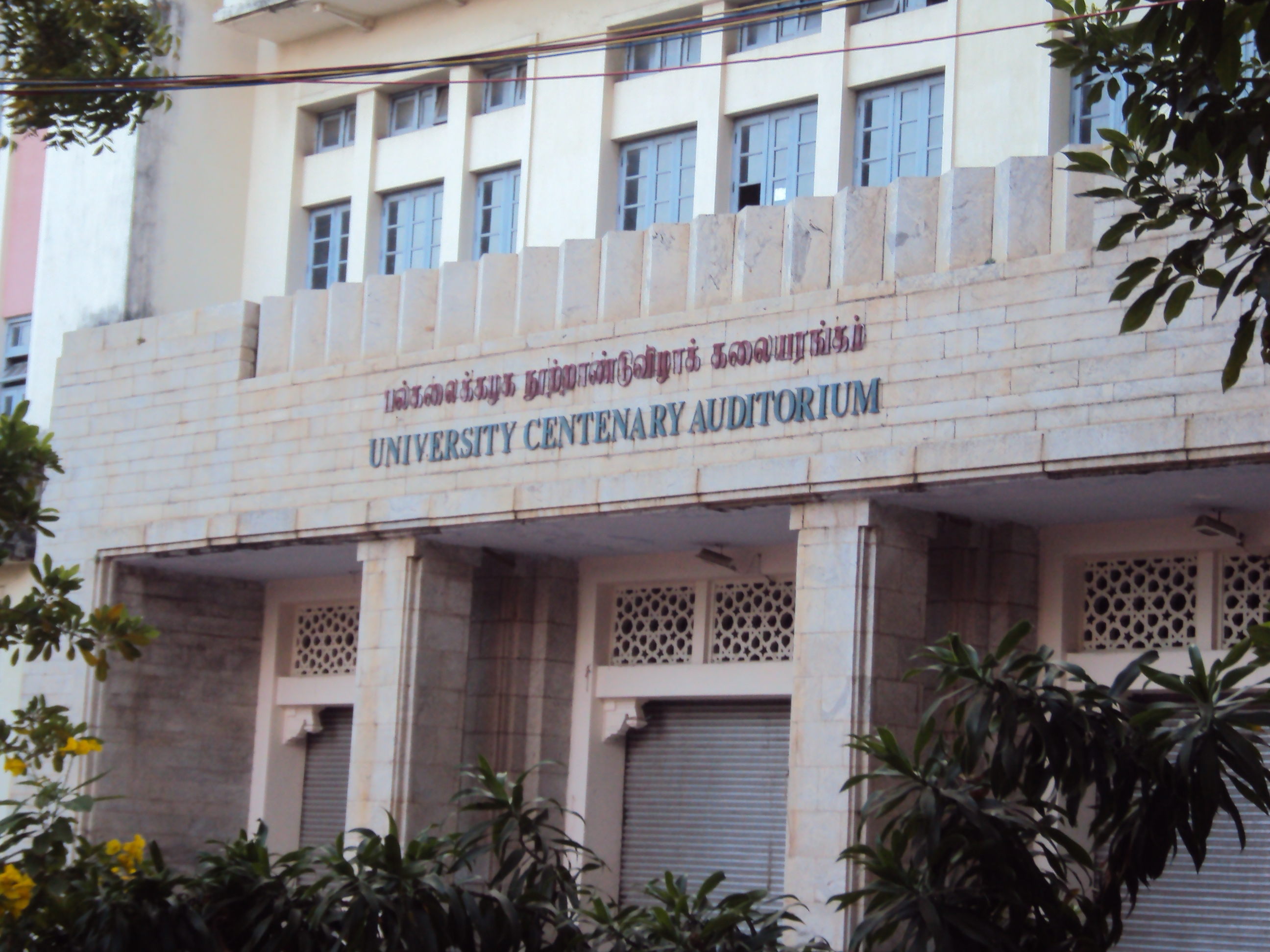 University of madras building